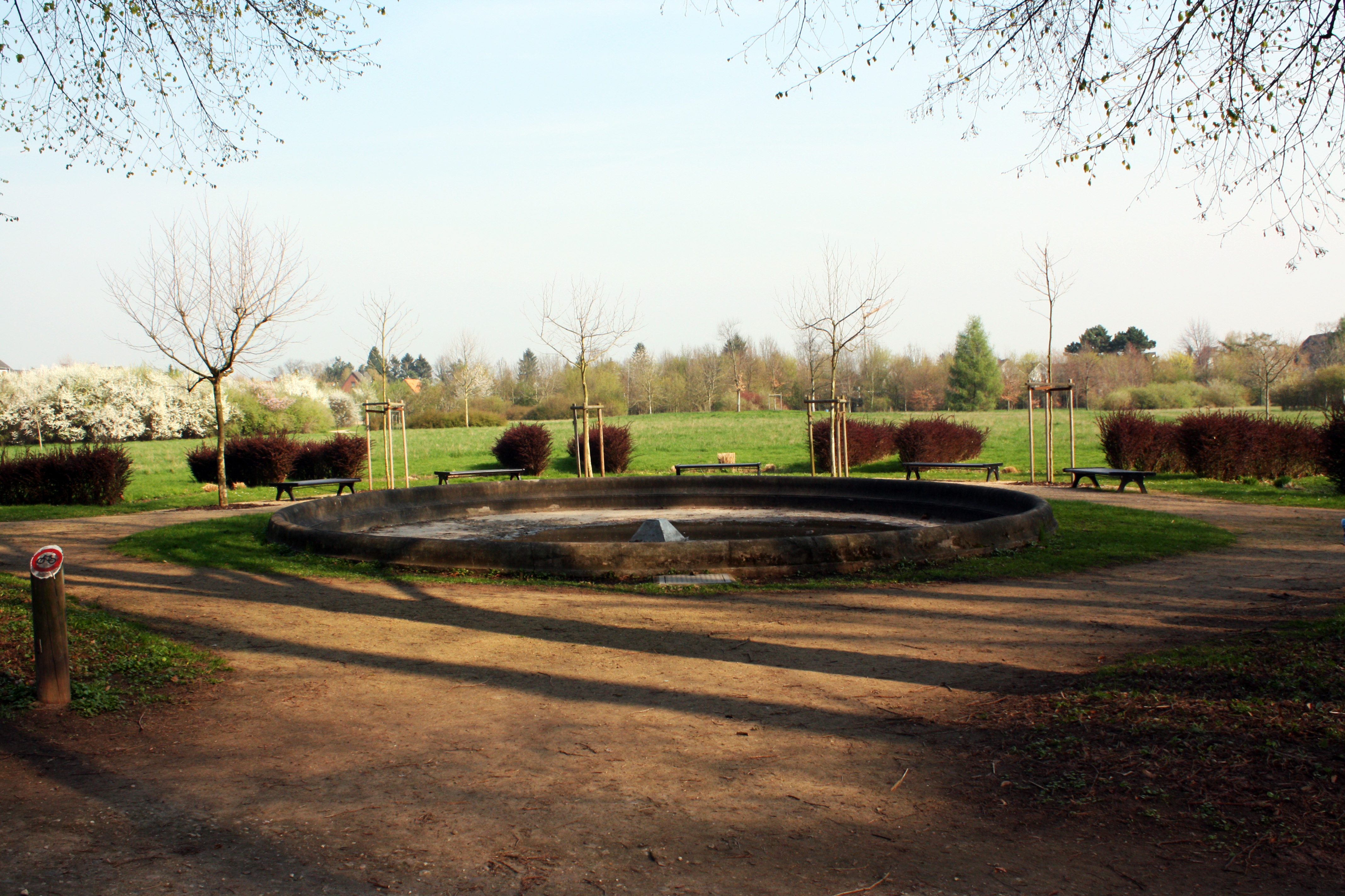 Parkanlagen Schloss Lechenich. Mit Berberitzen umgebener Brunnen und Ruhebänke